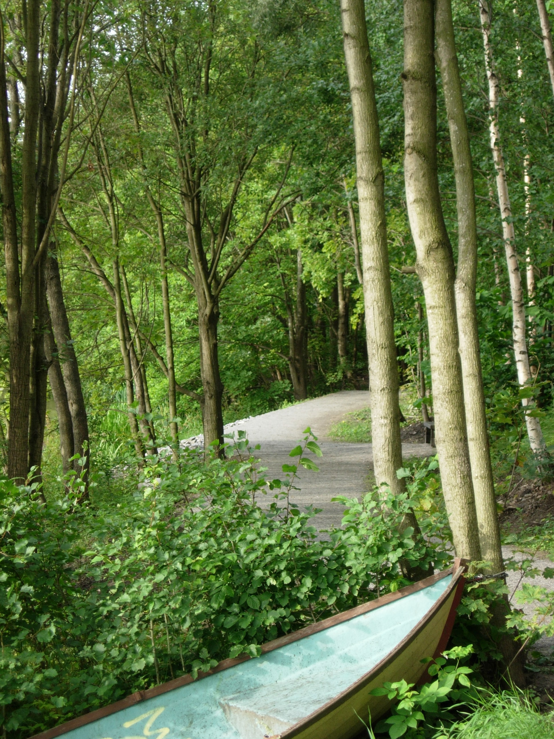 Aurajoen viertä kulkevaa uutta kävelypolkua. Kuva otettu rautatiesillasta hieman alajuoksulle, suurinpiirtein Kahlaajankadun kohdilta.